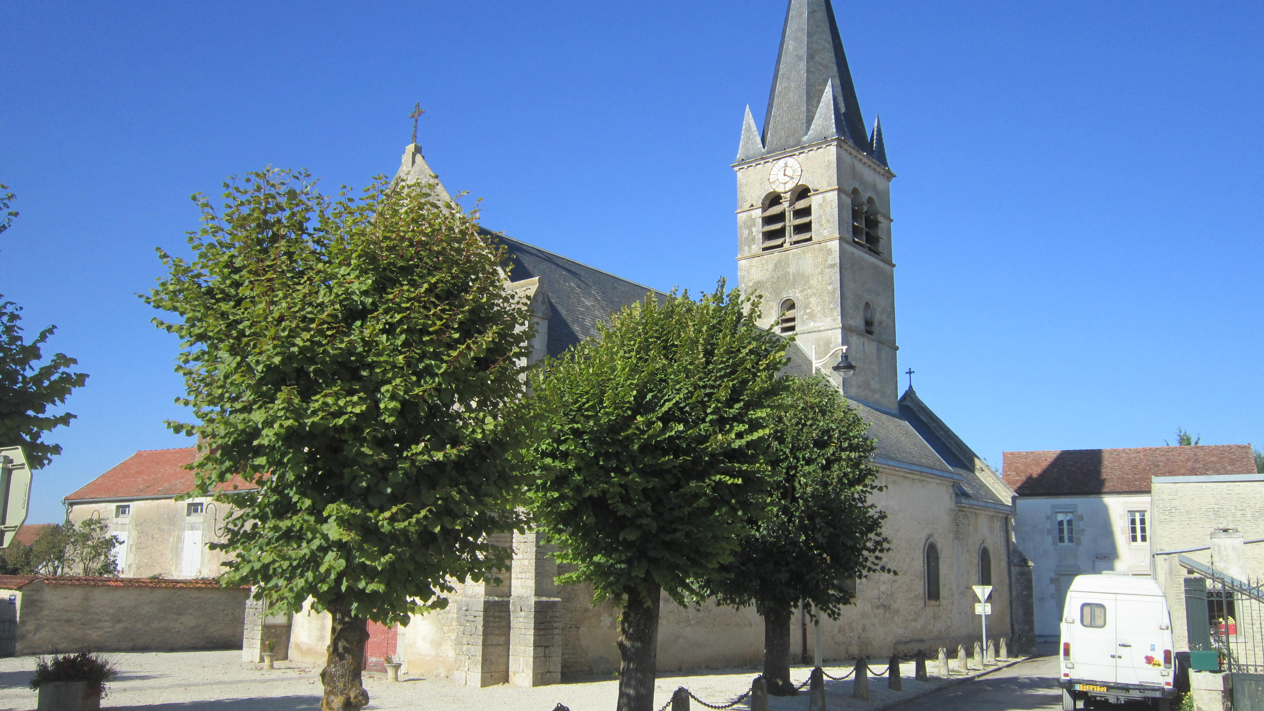 Prusly-sur-Ource (Côte-d'Or) : l'église